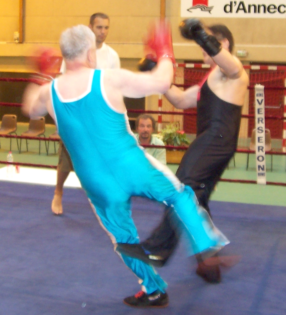 Boxe Française. Coup de pied bas contré par un fouetté.